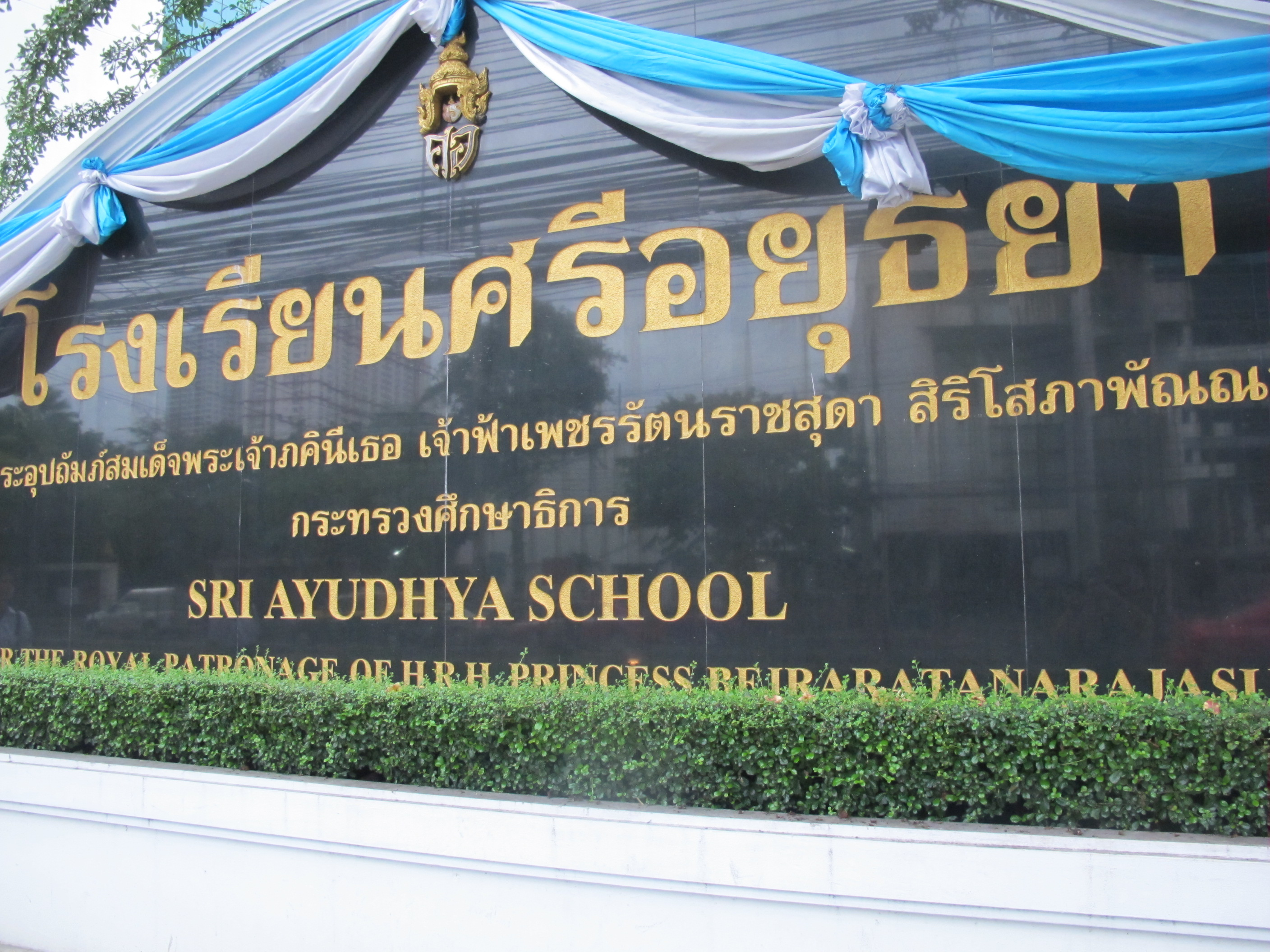 SRA AYUDHYA SCHOOL